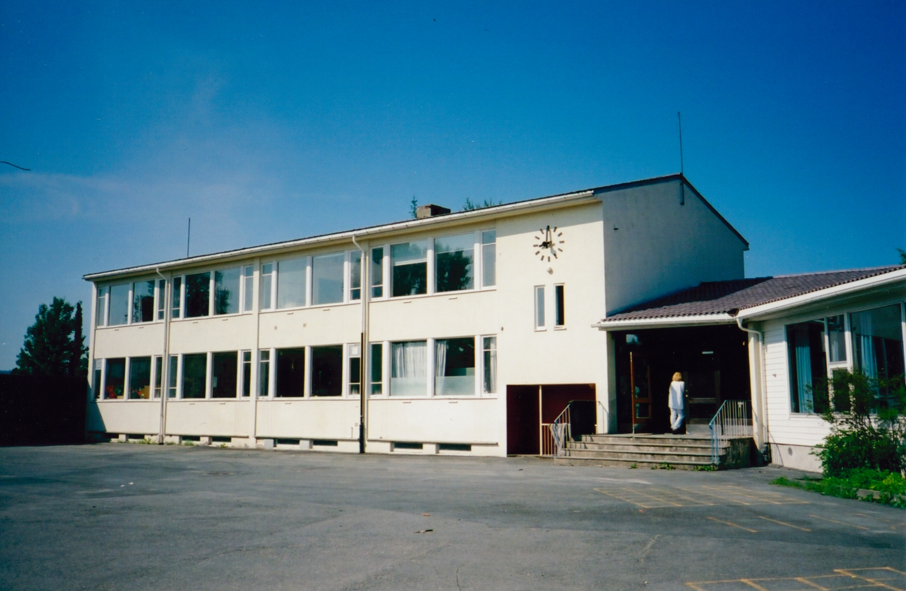 Format: Fotopositiv Dato / Date: 2003 Fotograf / Photographer: Byantikvaren Sted / Place: Spongdal, Byneset, Trondheim Wikipedia: Spongdal skole Eier / Owner Institution: Trondheim byarkiv, The Municipal Archives of Trondheim Arkivreferanse / Archive reference: Byantikvaren - Skoler i Trondheim 2003 - A1.S1.BC124 Spongdal skole, 7074 Spongdal, barne- og ungdomsskole (1.-10. trinn); ca. 350 elever (2007). Skolekretsen ble grunnlagt 1870 og samme år fikk skolen sine første bygninger. De nåværende bygningene ble oppført 1959 (ark. Bjarne Borgersen) og det ble oppført et nytt byggetrinn for ungdomsskolen 1972 (samme ark.); nybygg 1996 (ark. Gunnar Stenberg). Skolen har felles musikkorps med Nypvang skole; Spongdal og Nypvang skolekorps. Kilde: Terje Bratberg: Trondheim byleksikon (Oslo 2008) s. 495.